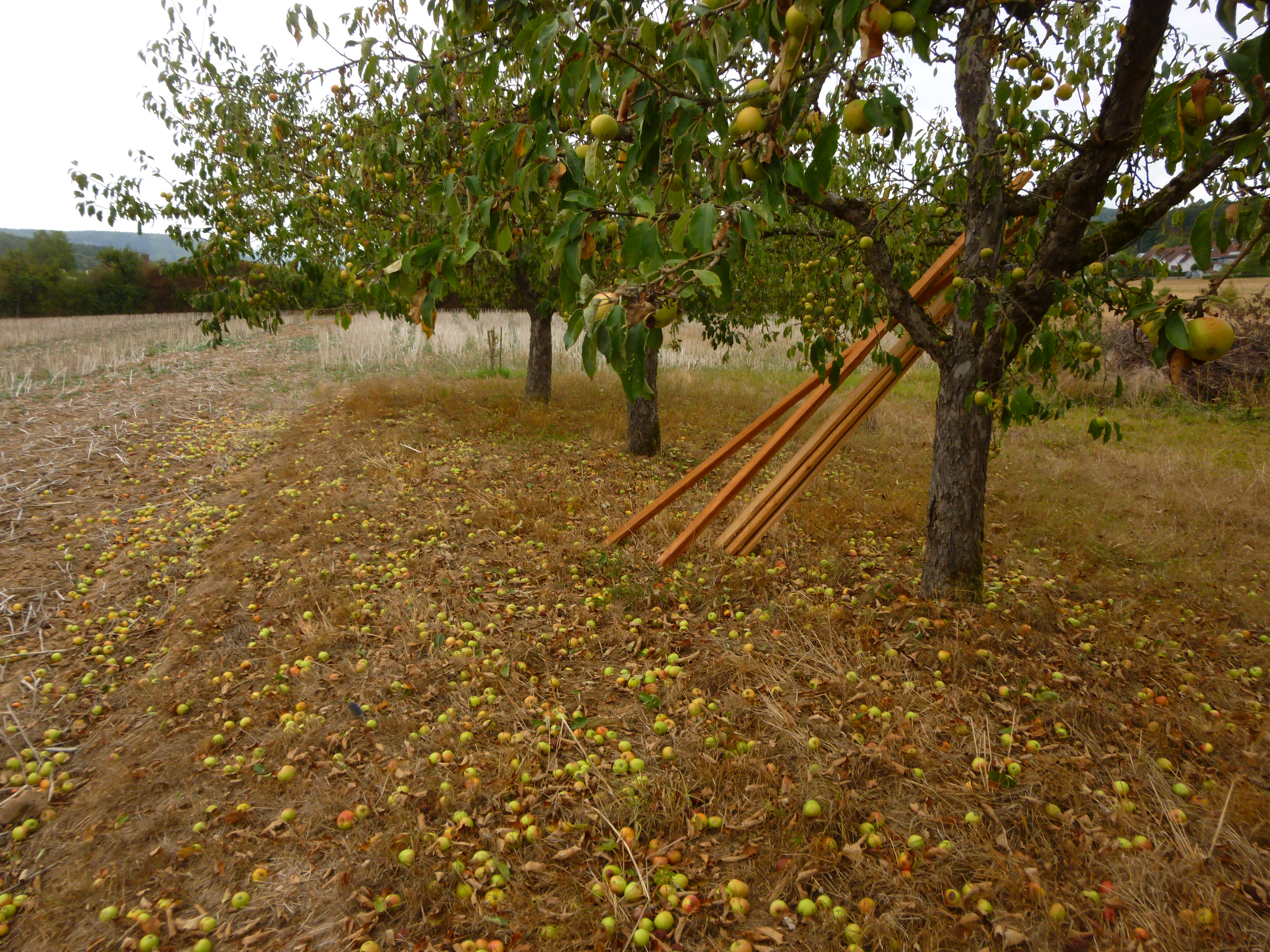 In Folge der Dürre deutlich zu klein gebliebene Mostäpfel. Was zuerst ein Rekordjahr in Sachen Apfelernte zu werden schien, lief letzten Endes nur auf eine "gute" Ente hinaus. Das Sammeln der Früchte stellte aufgrund der sehr geringen Größe im Gegensatz zu allen Jahren davor eine außerordentliche Herausforderung dar und war die Mühe im Prinzip nicht wert.